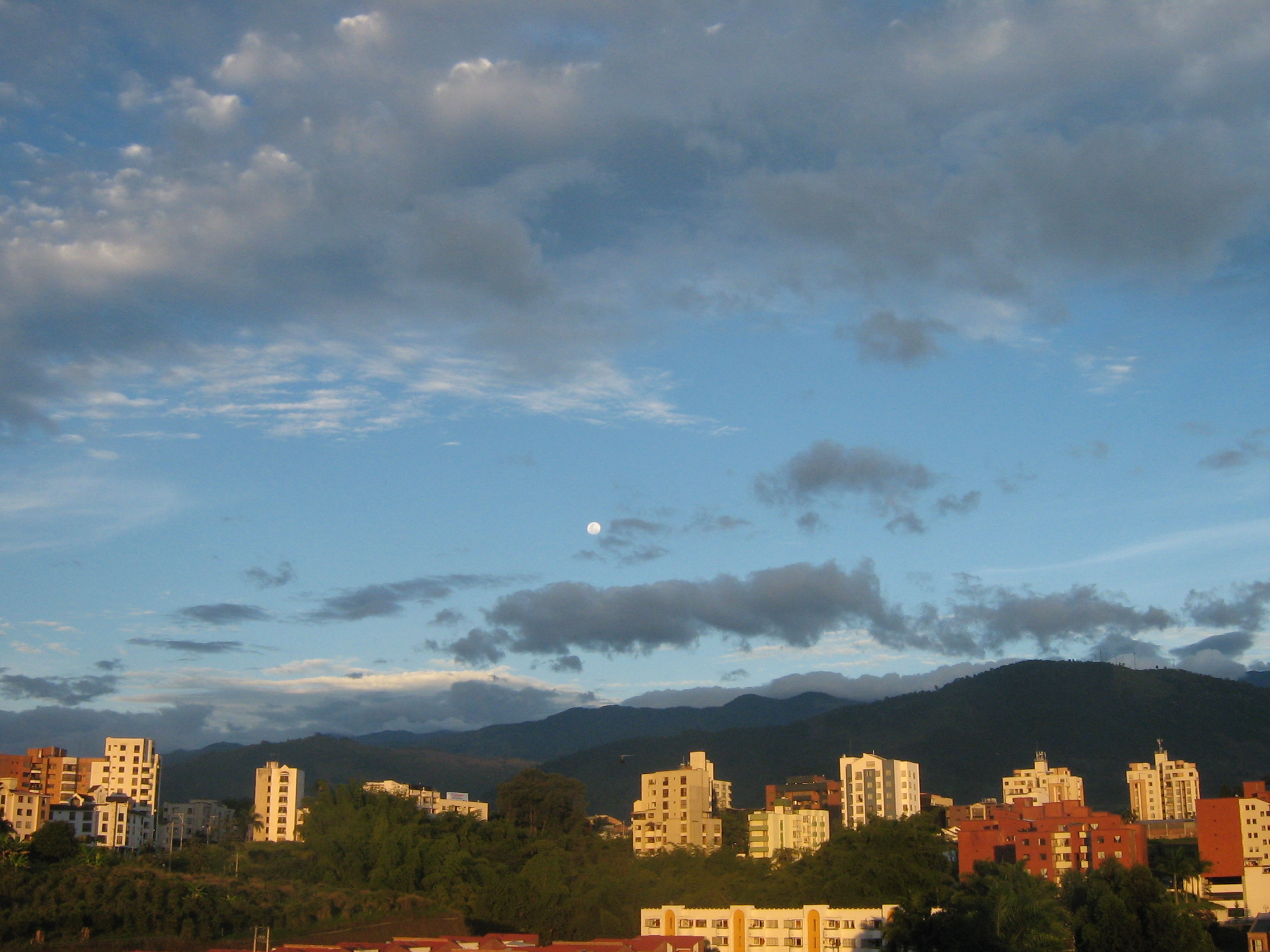 Armenia, Quindio, Colombia